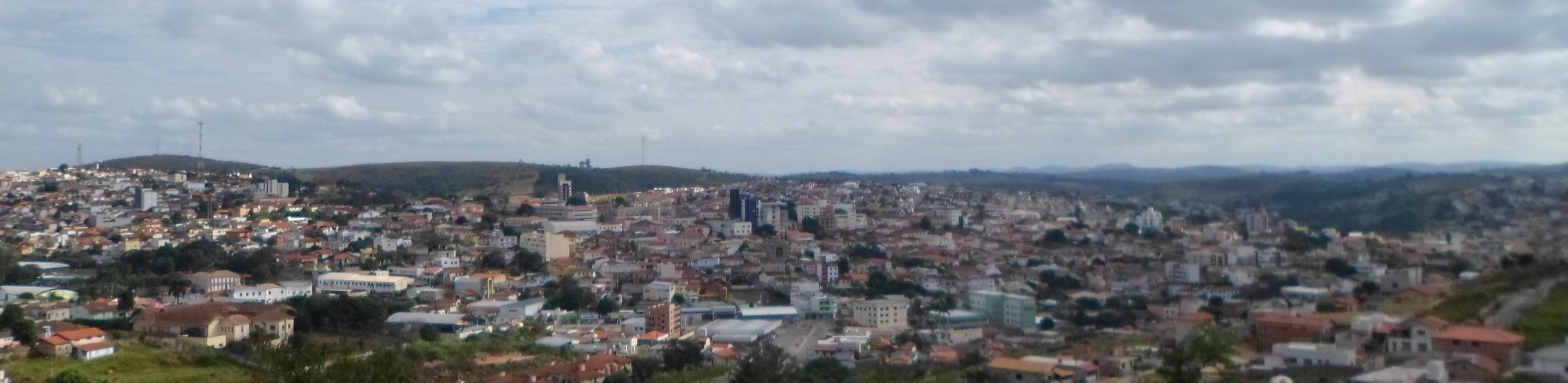 Vista panorâmica de Oliveira